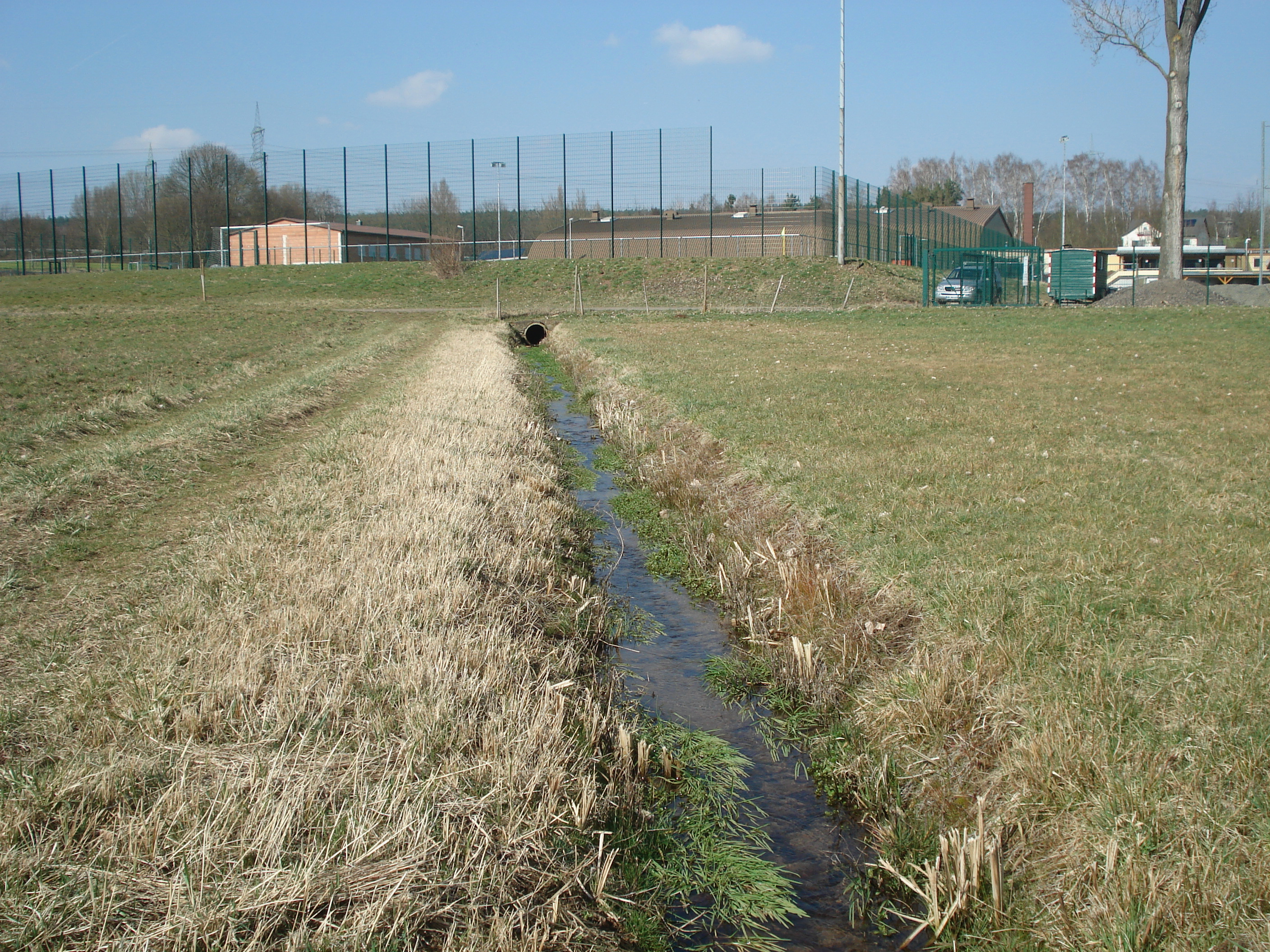 Die Streu (Streubach) bei Michelbach